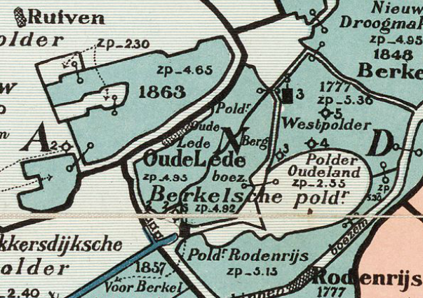 Oude_Leedsche_polder